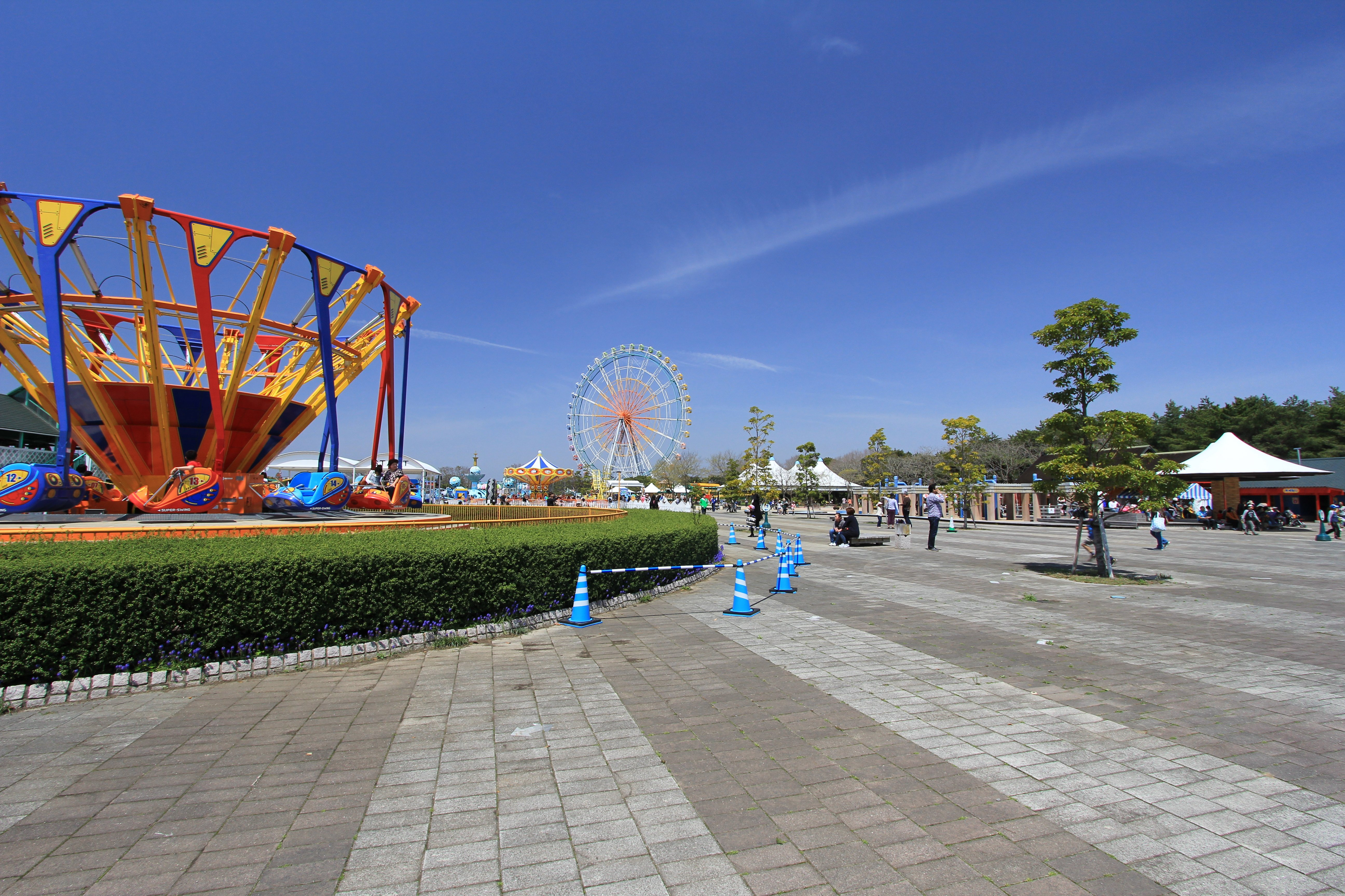 ひたち海浜公園